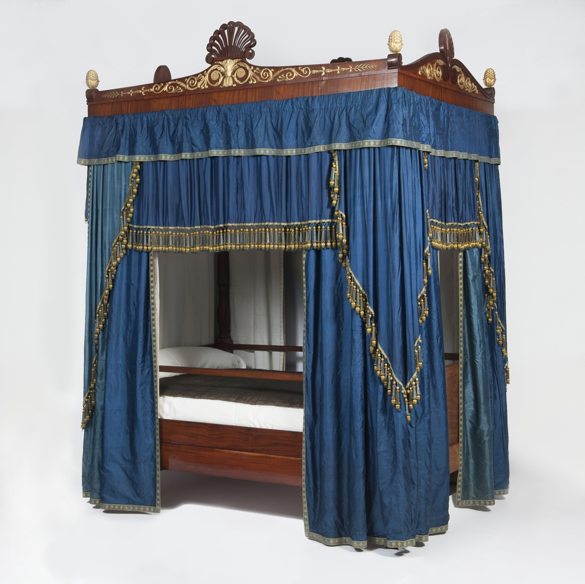 Himmelseng, Aksesjon: 1908 (Deponert til Norsk Folkemuseum) Deponert fra: Statens Samlinger. Oscar IIs gave. Mål:Høyde: 267 cm, Bredde: 144 cm, Lengde: 209 cm. Materiale: Tre, mahogny. Farge: Forgyllt, brun/gul. Fra utstillingen "1814 – Spillet om Danmark og Norge" ved Norsk Folkemuseum 14. januar 2014 — 31. juli 2014.